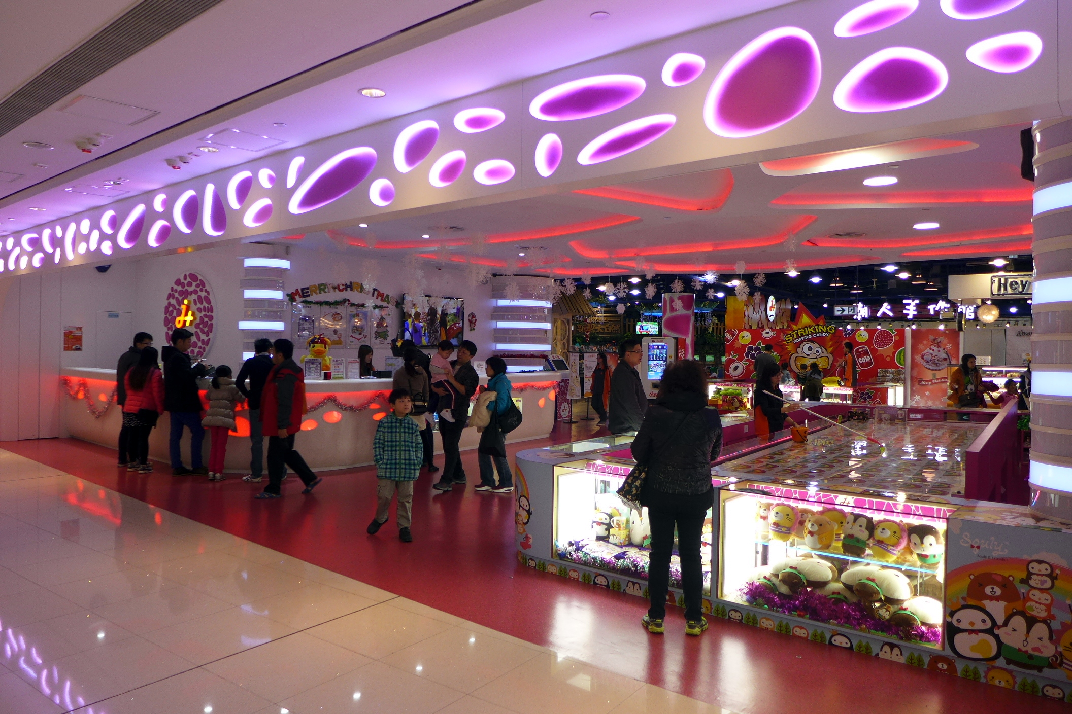 Domain Mall J-plus